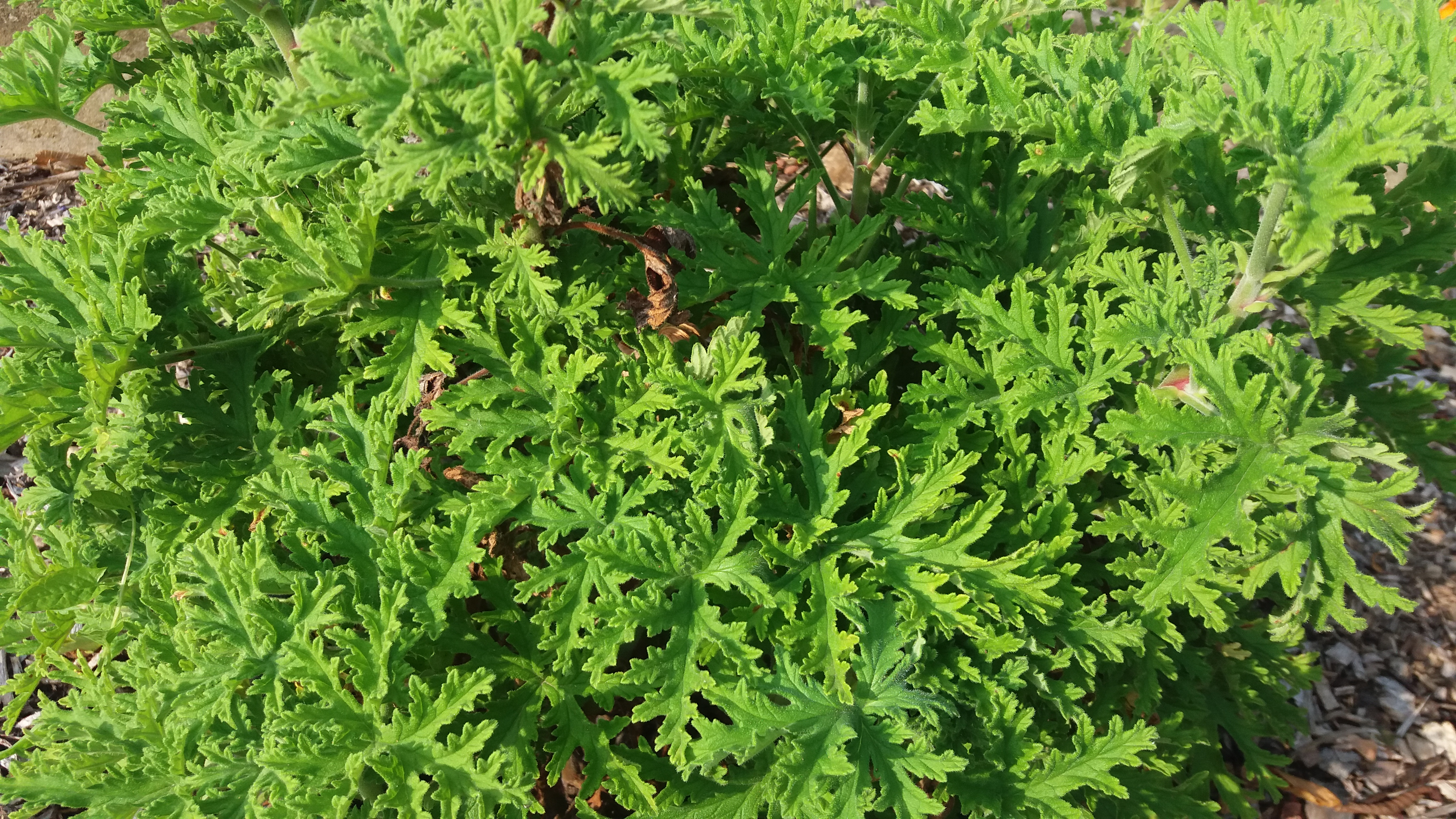 Photo des feuilles d'un Pelargonium graveolens.